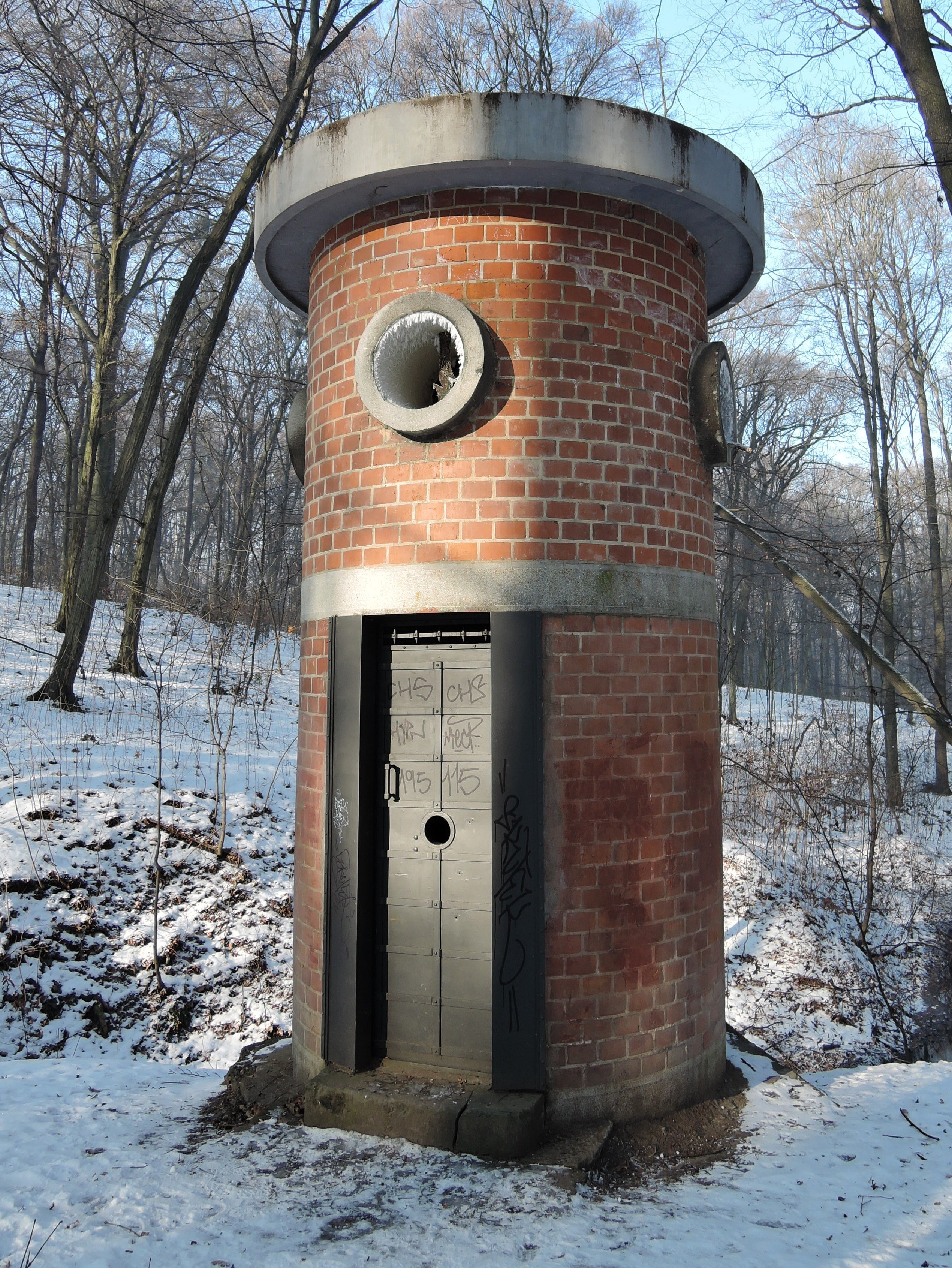 Praha, Liboc, obora Hvězda, vodojem u potoka Světluška